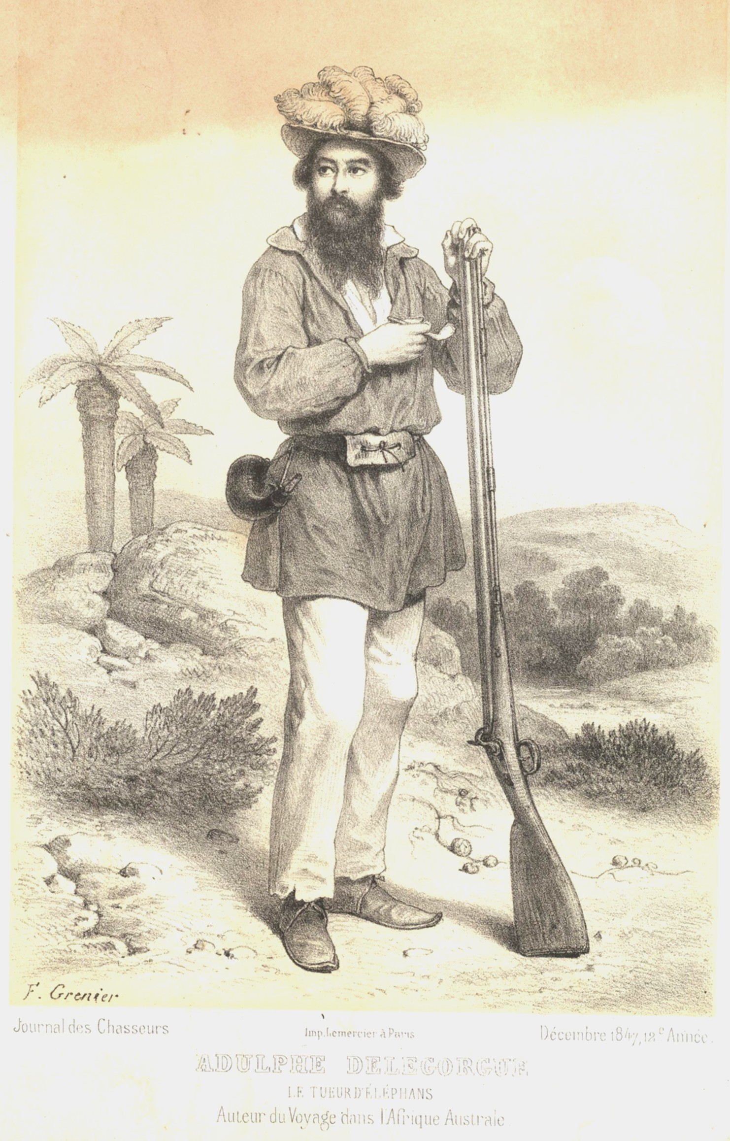 Dessin représentant Adulphe Delegorgue (1814-1850) chasseur et naturaliste français, paru dans le Journal des Chasseurs et réalise par F Grenier.